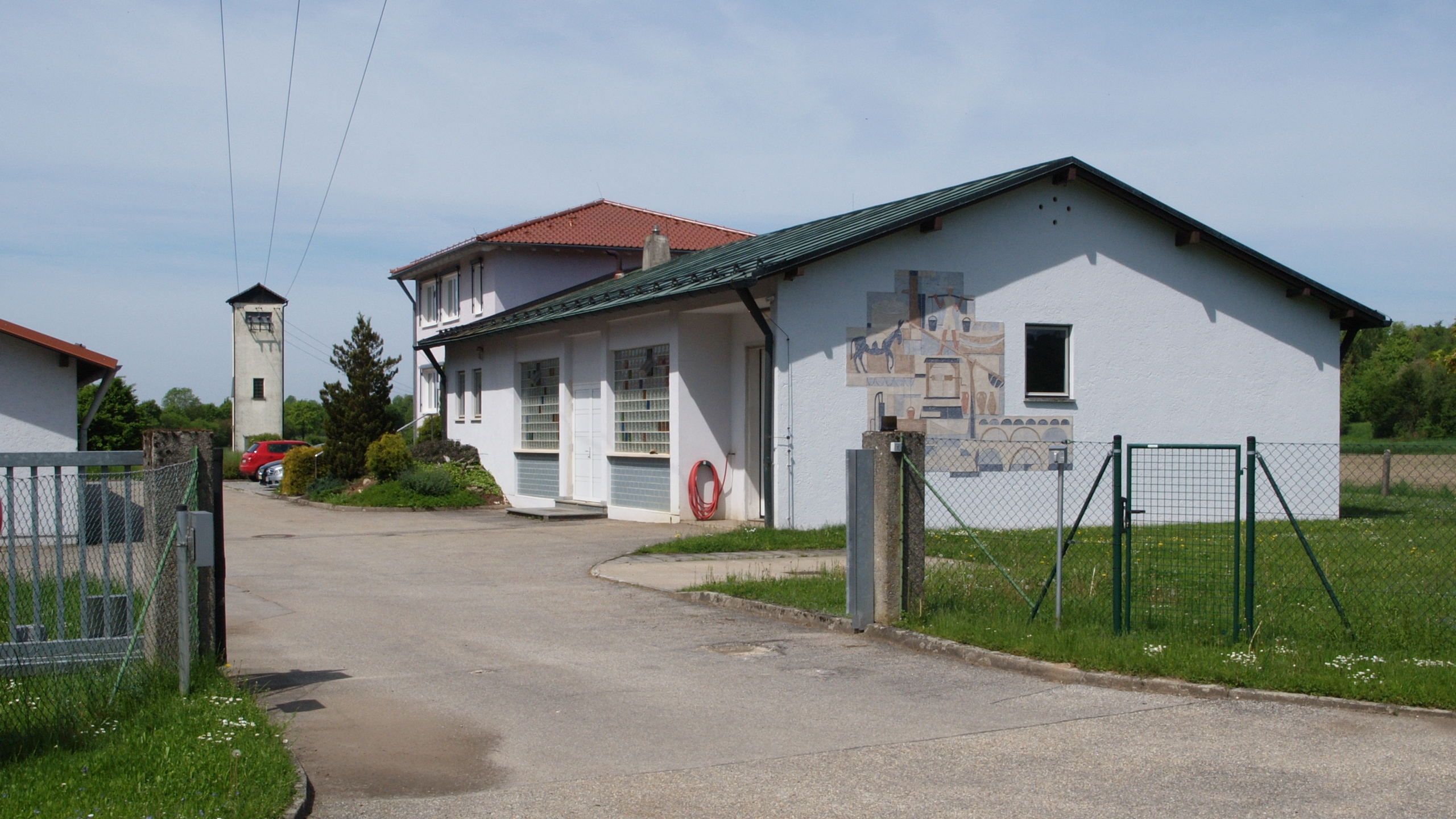 Wasserzweckverband Buchberggruppe Wasserwerk